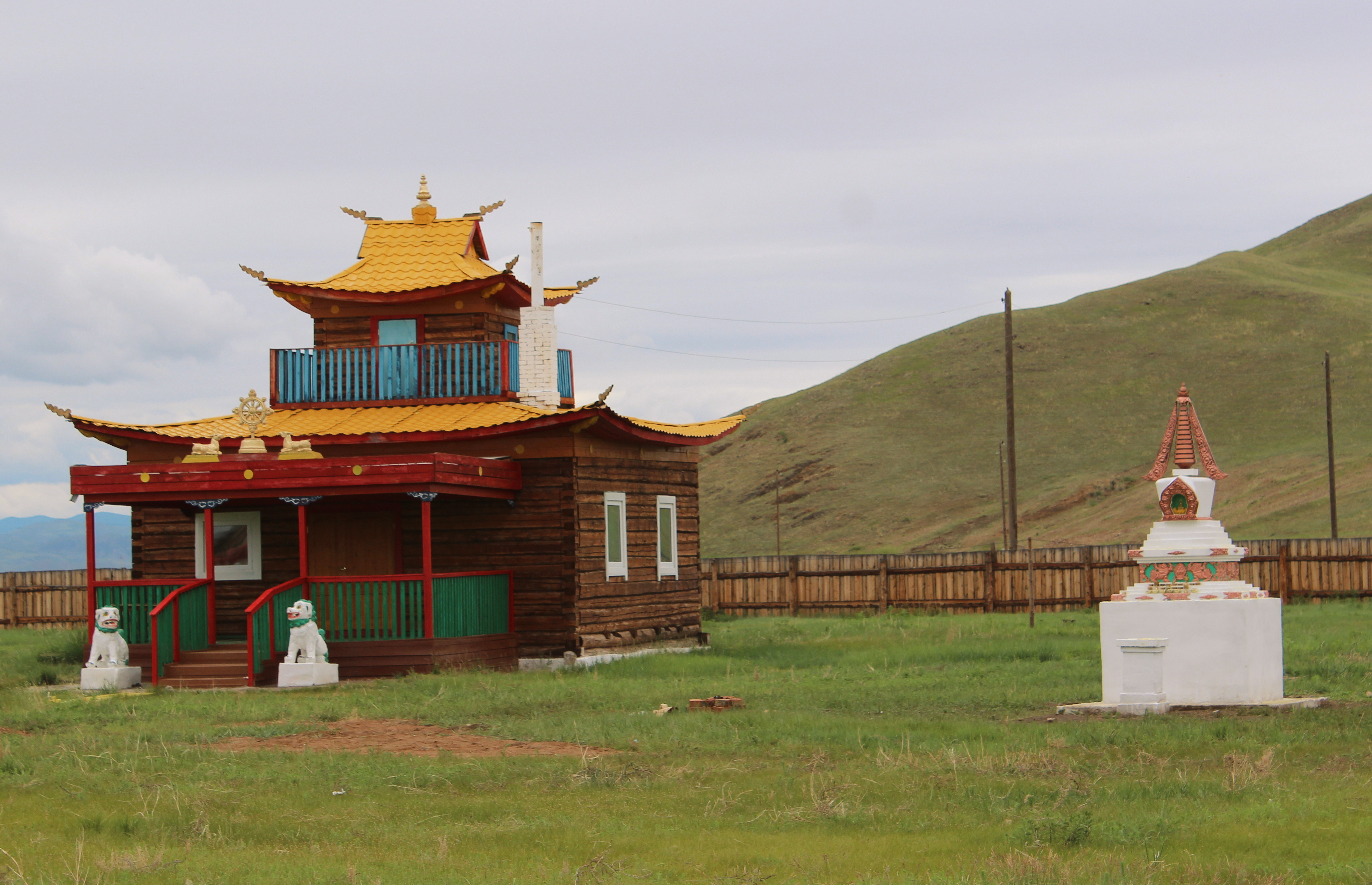 Табангут-Ичётуйский дацан в окрестностях села Додо-Ичётуй. Бурятия, Джидинский район